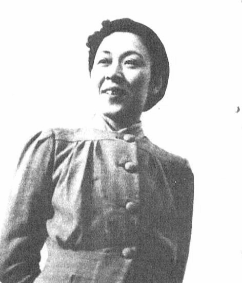 読売新聞社『家庭よみうり』351号（1953年）より村瀬幸子